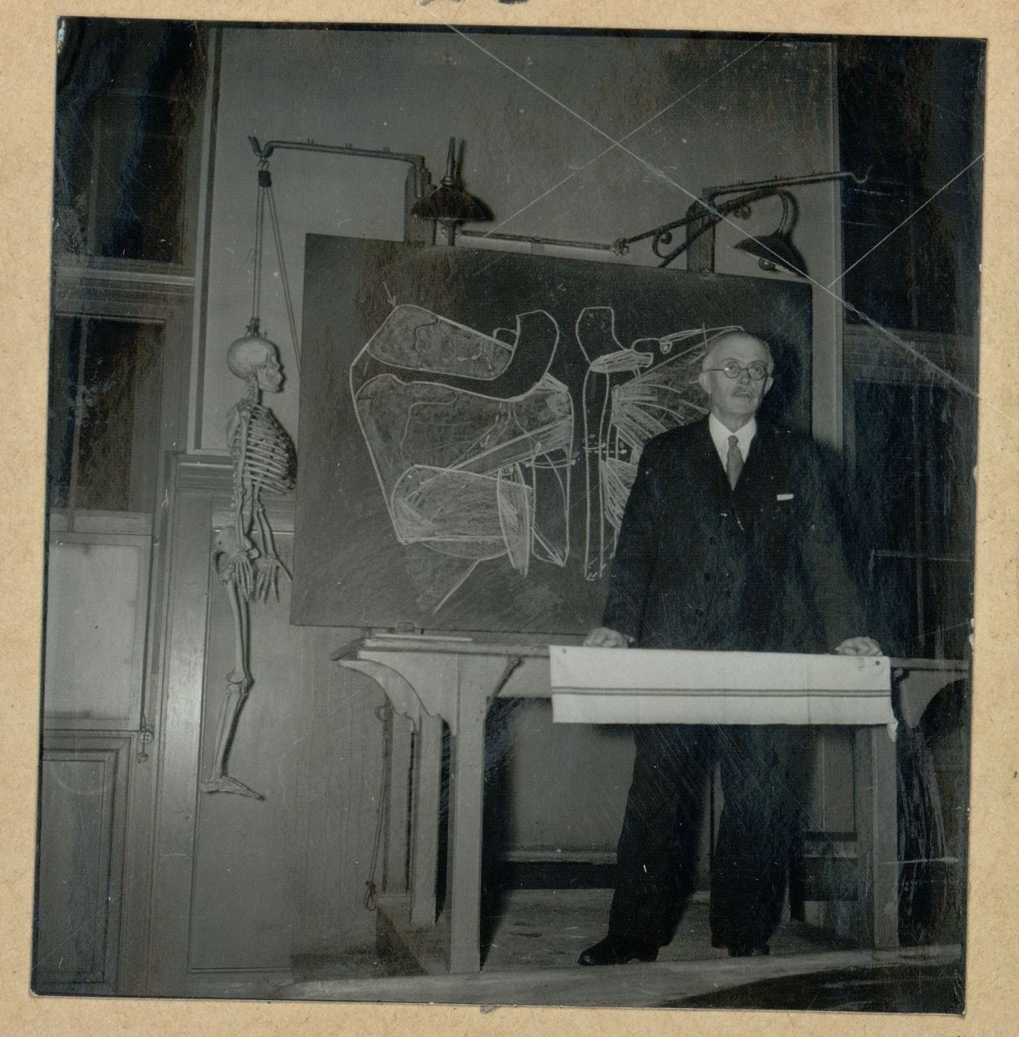 Photographie